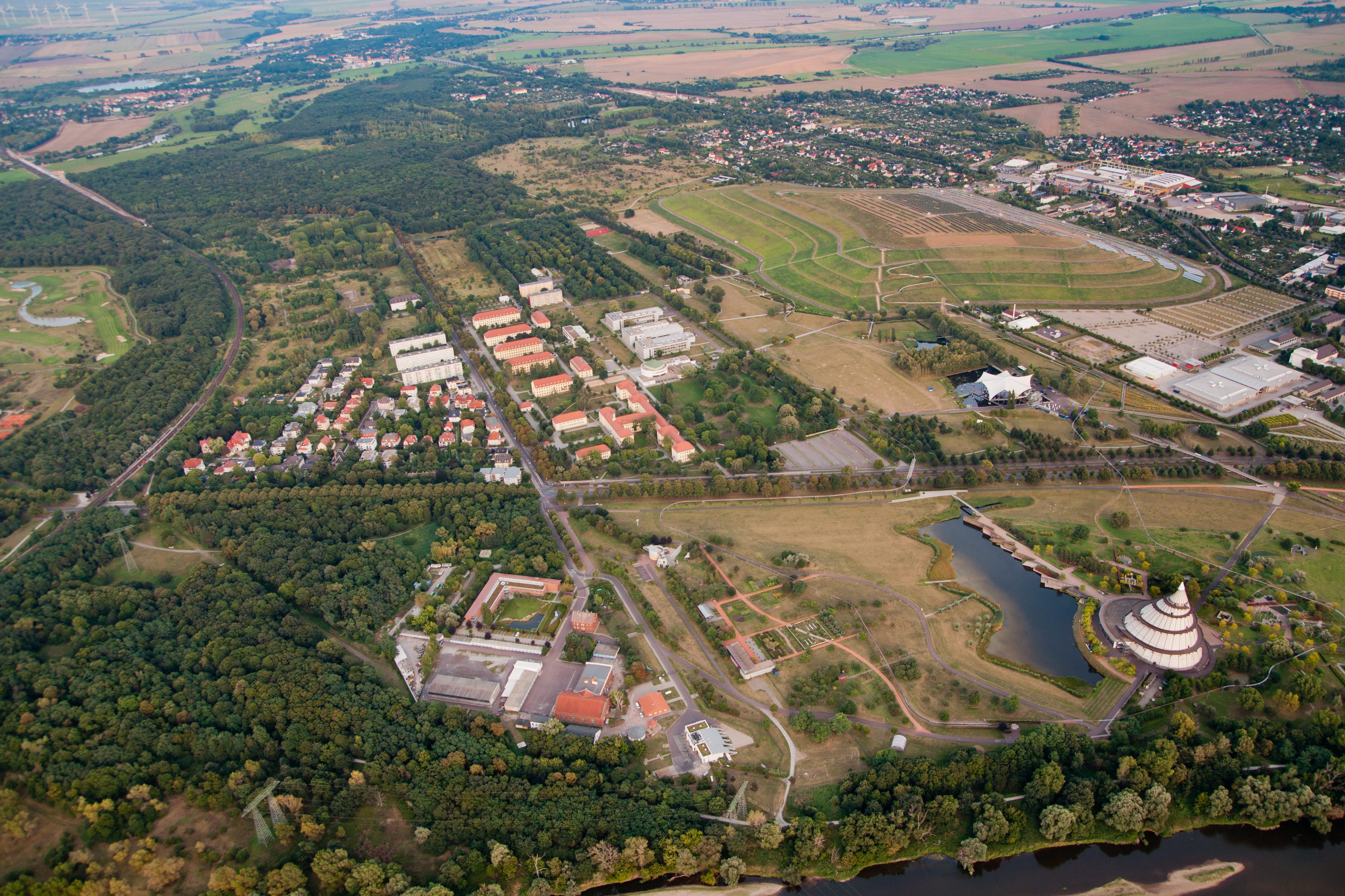 Blick aus einem Ballon über den Elbauenpark Magdeburg